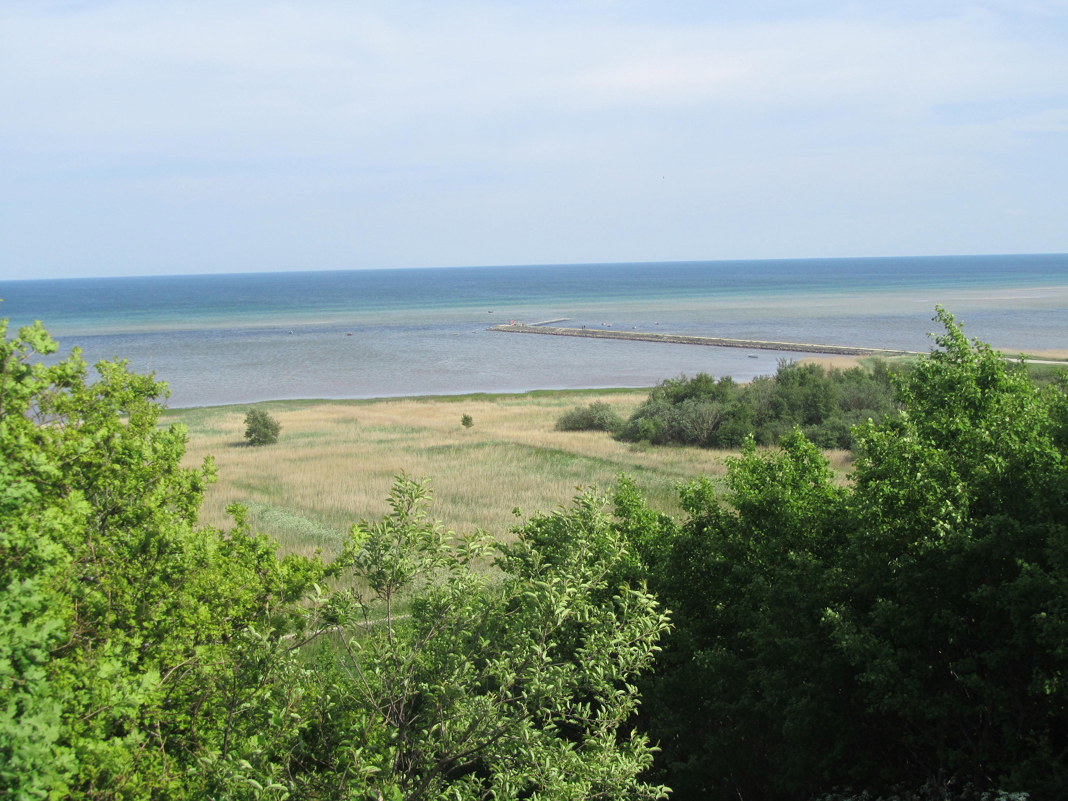 Mulbjerge udsigt mod bademolen og Kattegat